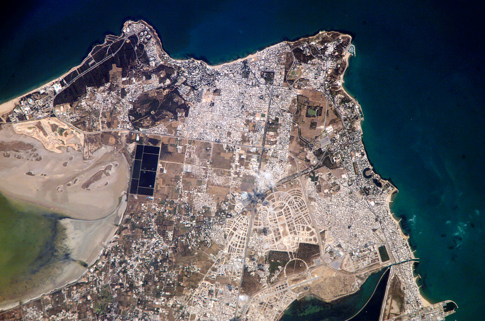 Carthago, Tunesie. 8 juni, 2006 NASA